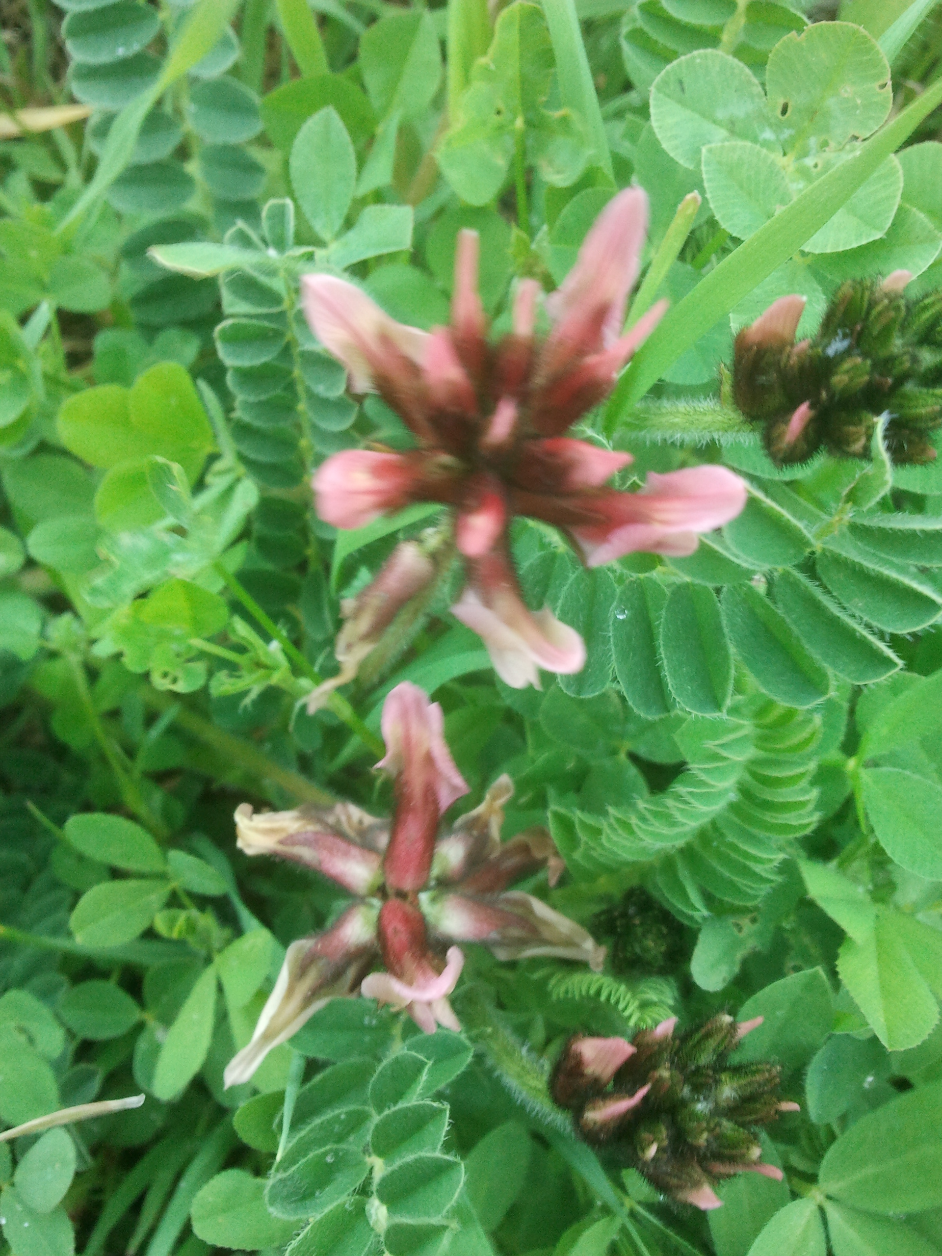 קדד בירותי בתת-משפחת הפרפרניים, בנחל תות ברמות מנשה